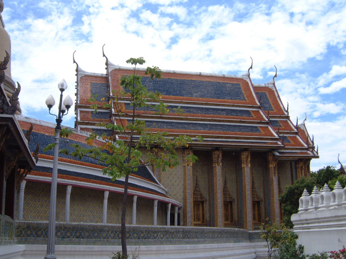 Wat Ratchabopit (วัดราชบพิธสถิตมหาสีมารามราชวรวิหาร), Bangkok, Thailand